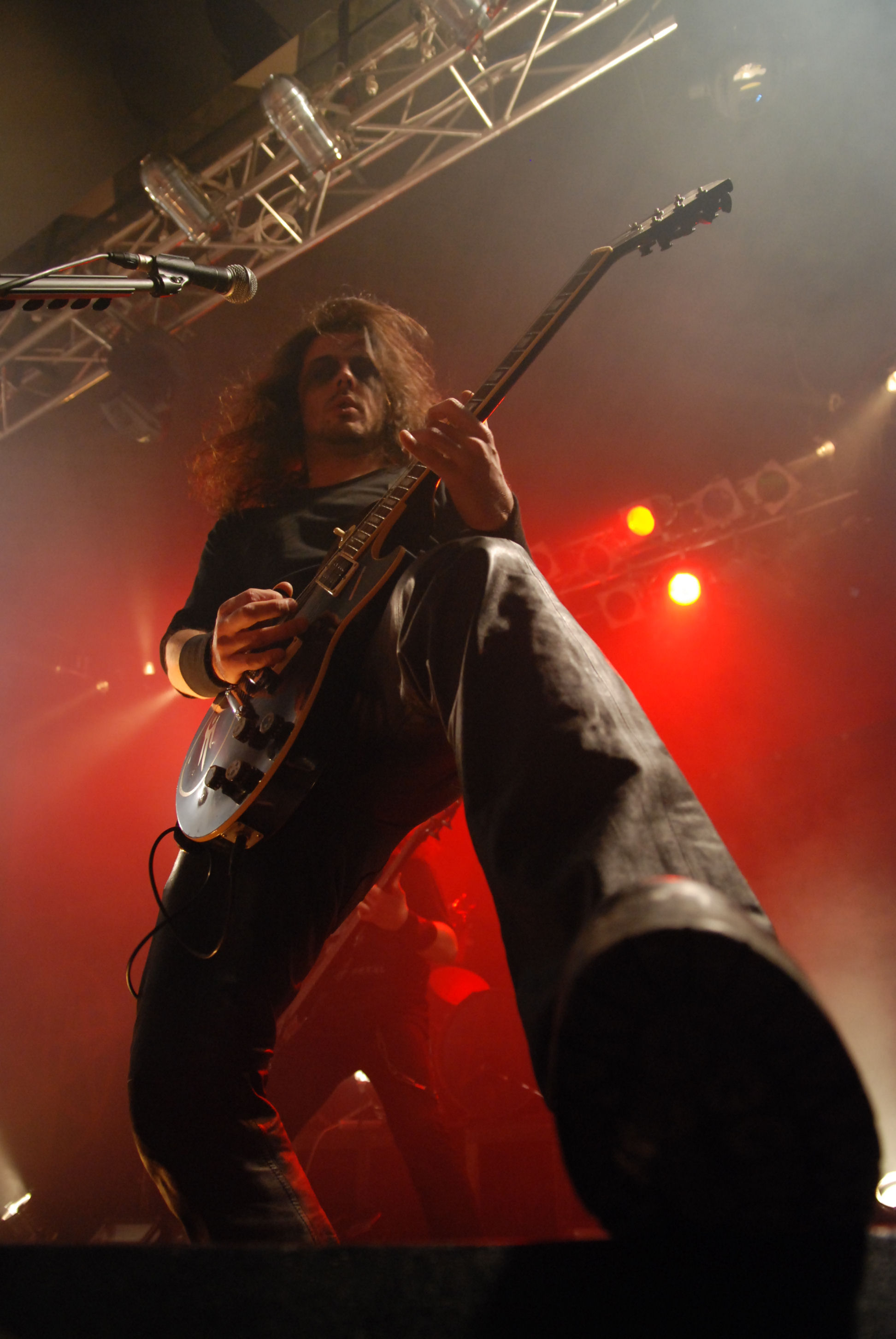 Koncert Moonspell'a (Ricardo Amorim) w klubie Studio w Krakowie